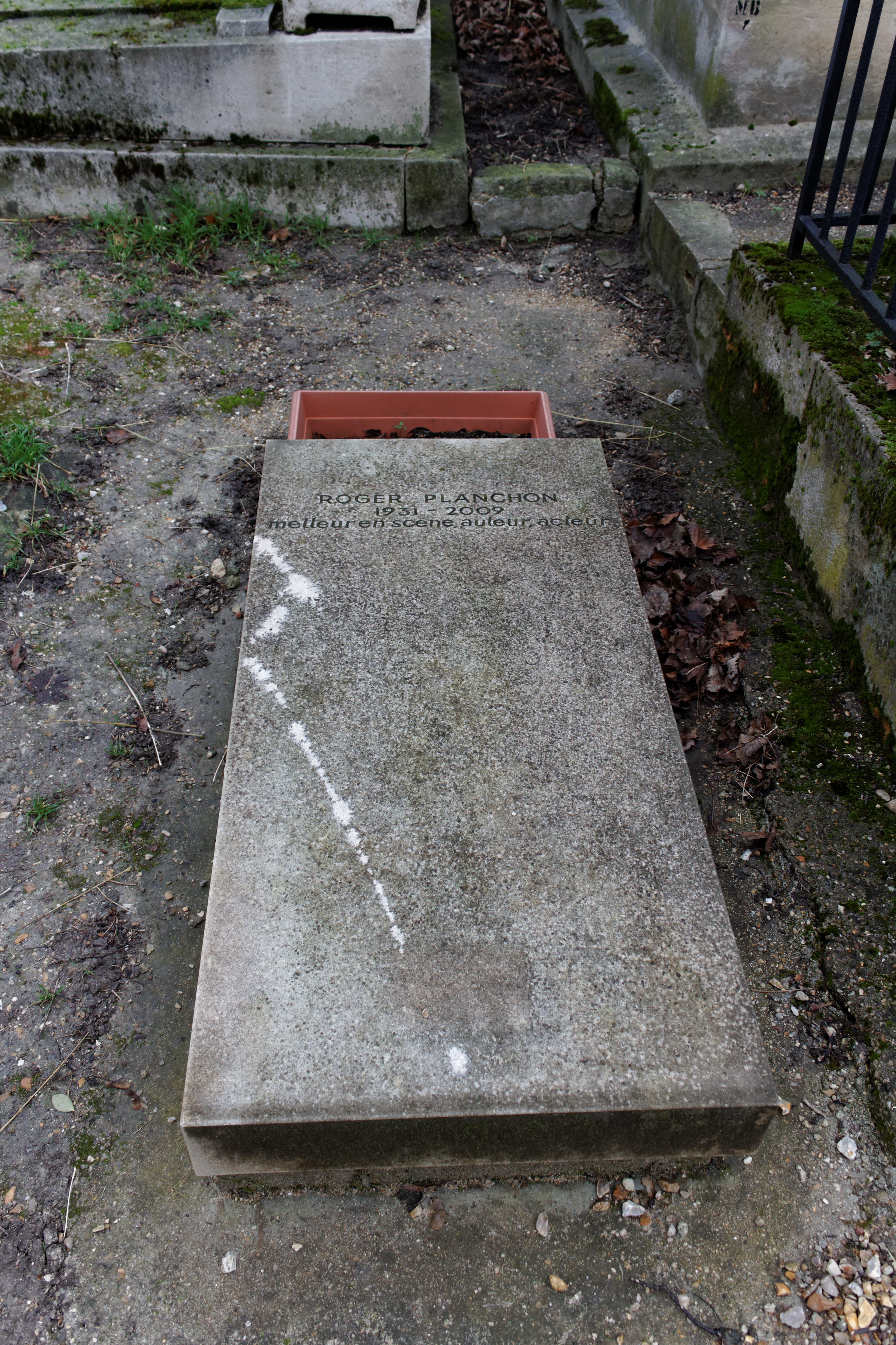 Vue d'ensemble